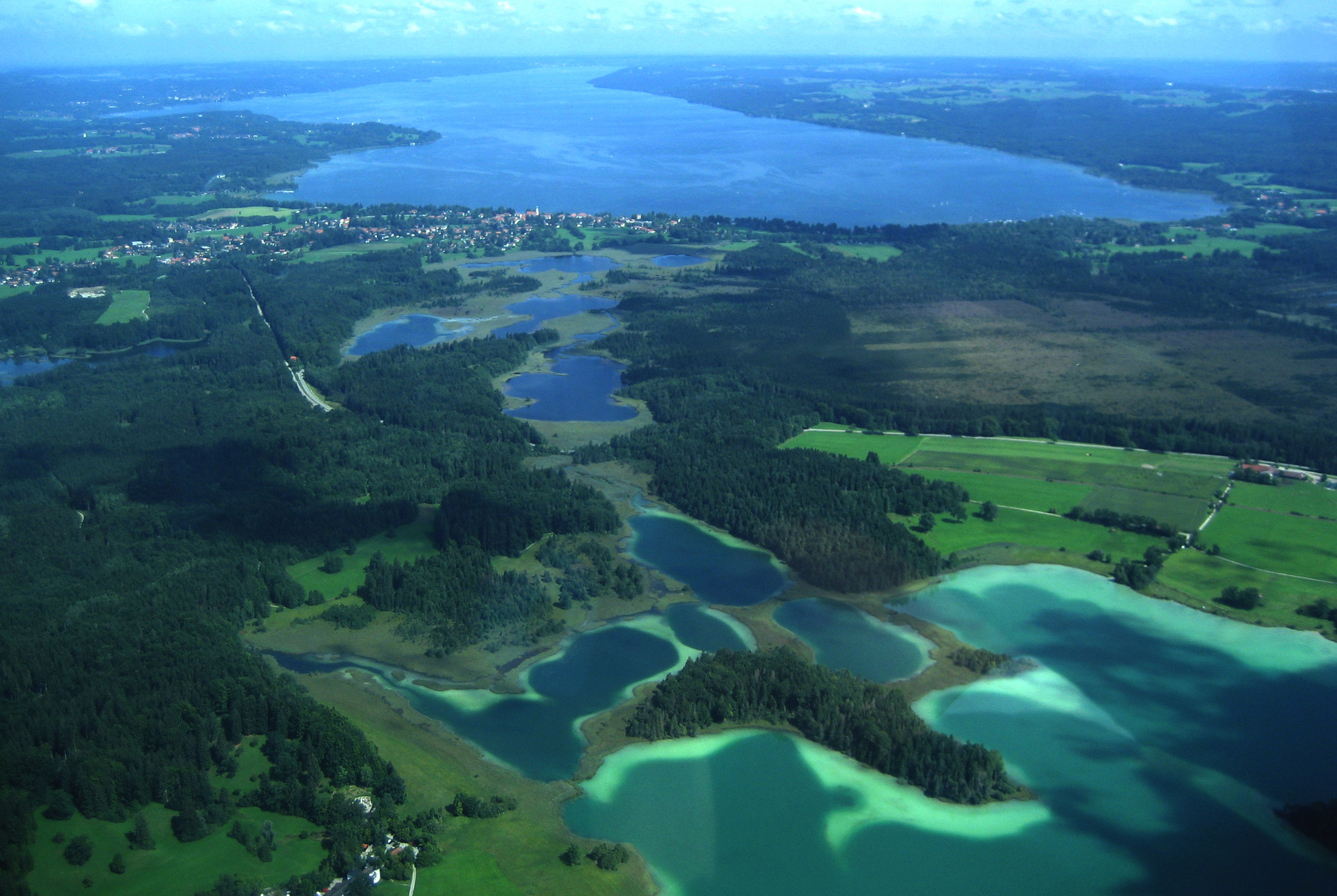 Luftaufnahme der Osterseen, Blick nach Norden in Richtung Starnberger See